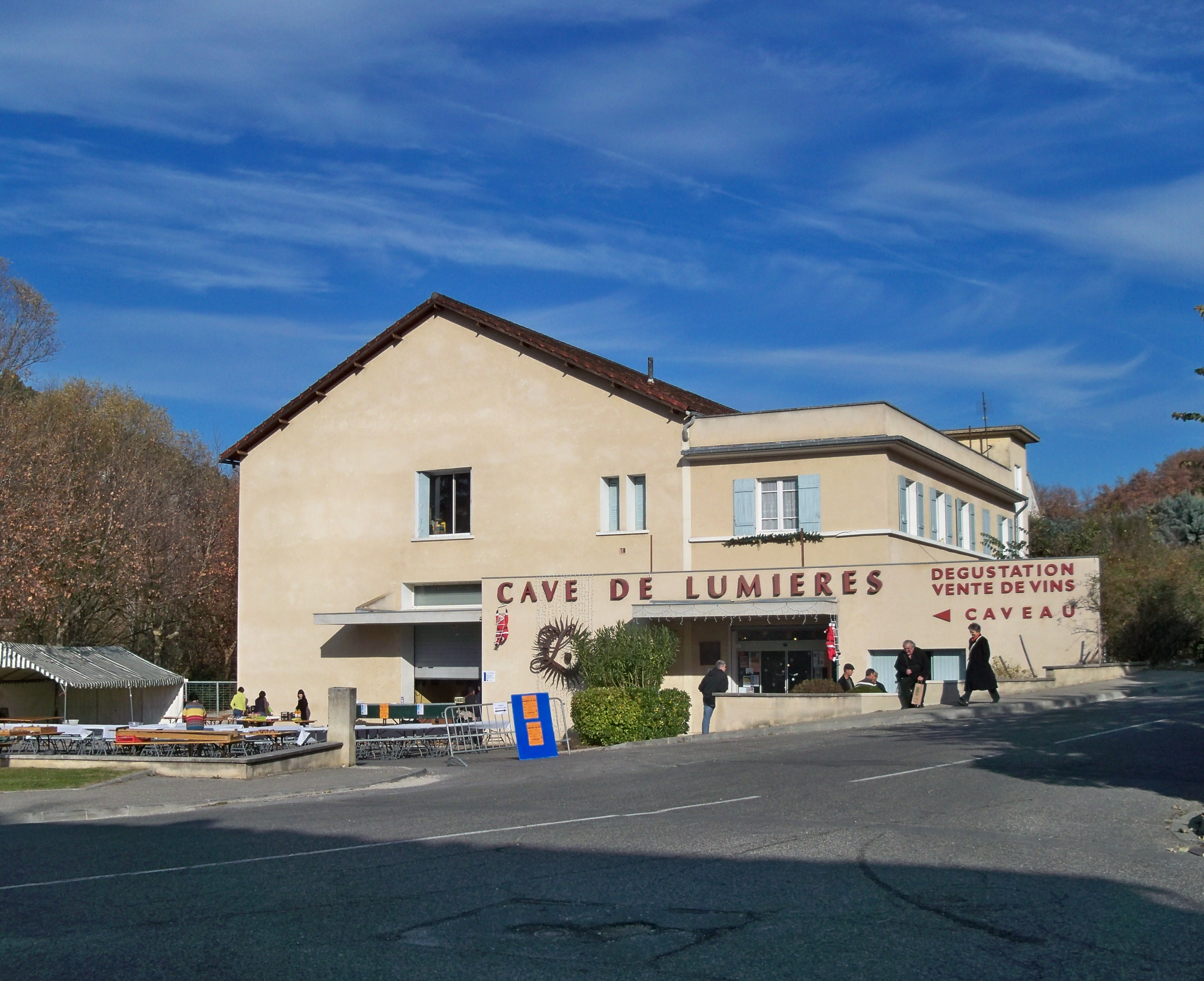 Cave coopérative de Lumières, commune de Goult (84)